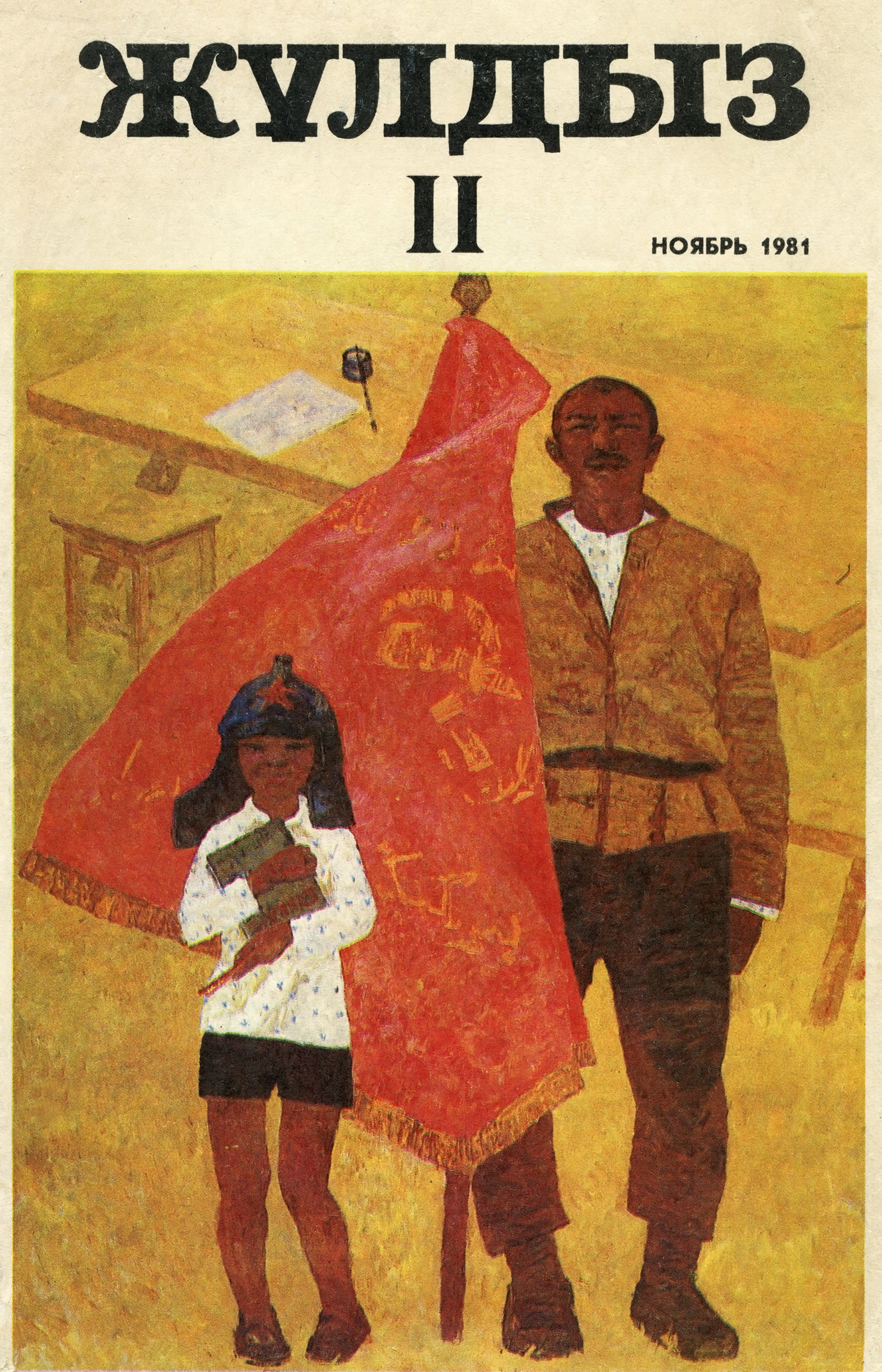 Работа «Знамя Коммуны» Молдабекова А. на обложке журнала "Жулдыз", ноябрь 1981 год